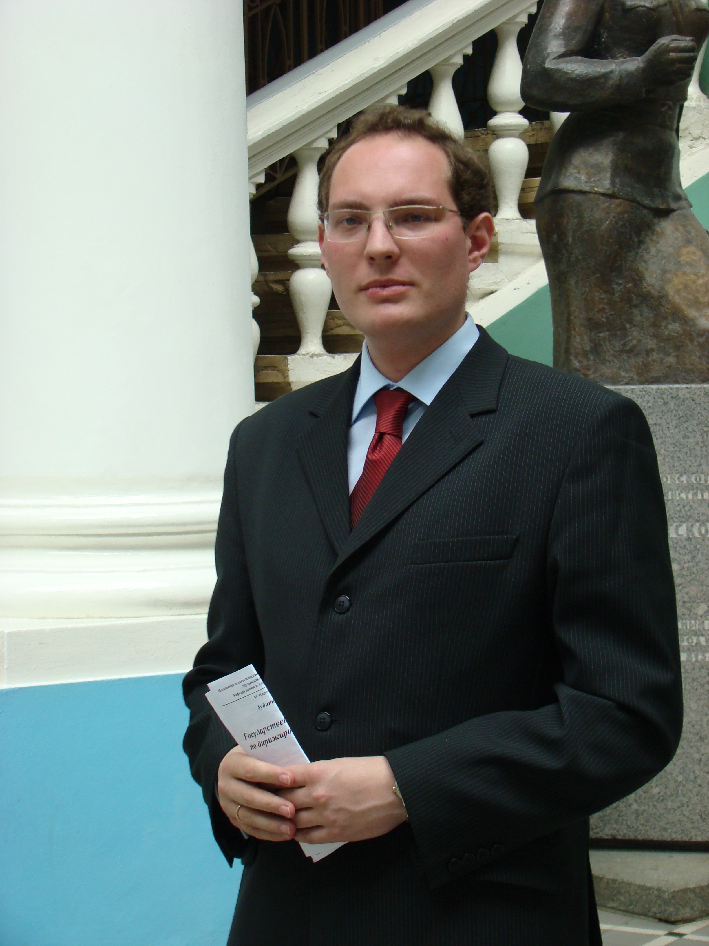 Соловьёв А.В.